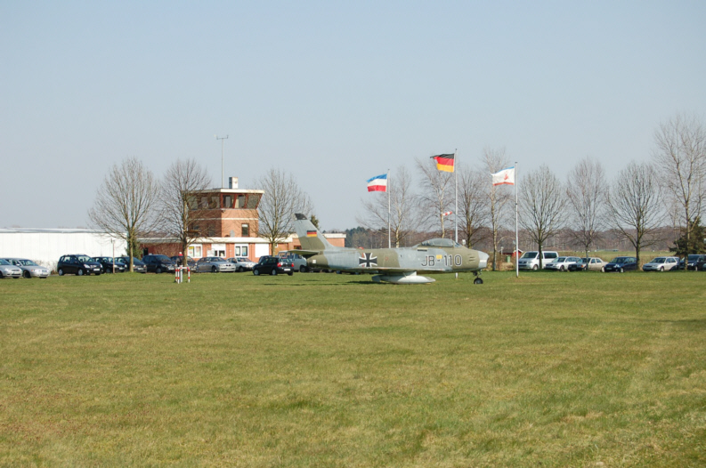 Flugplatz Uetersen mit Tower.